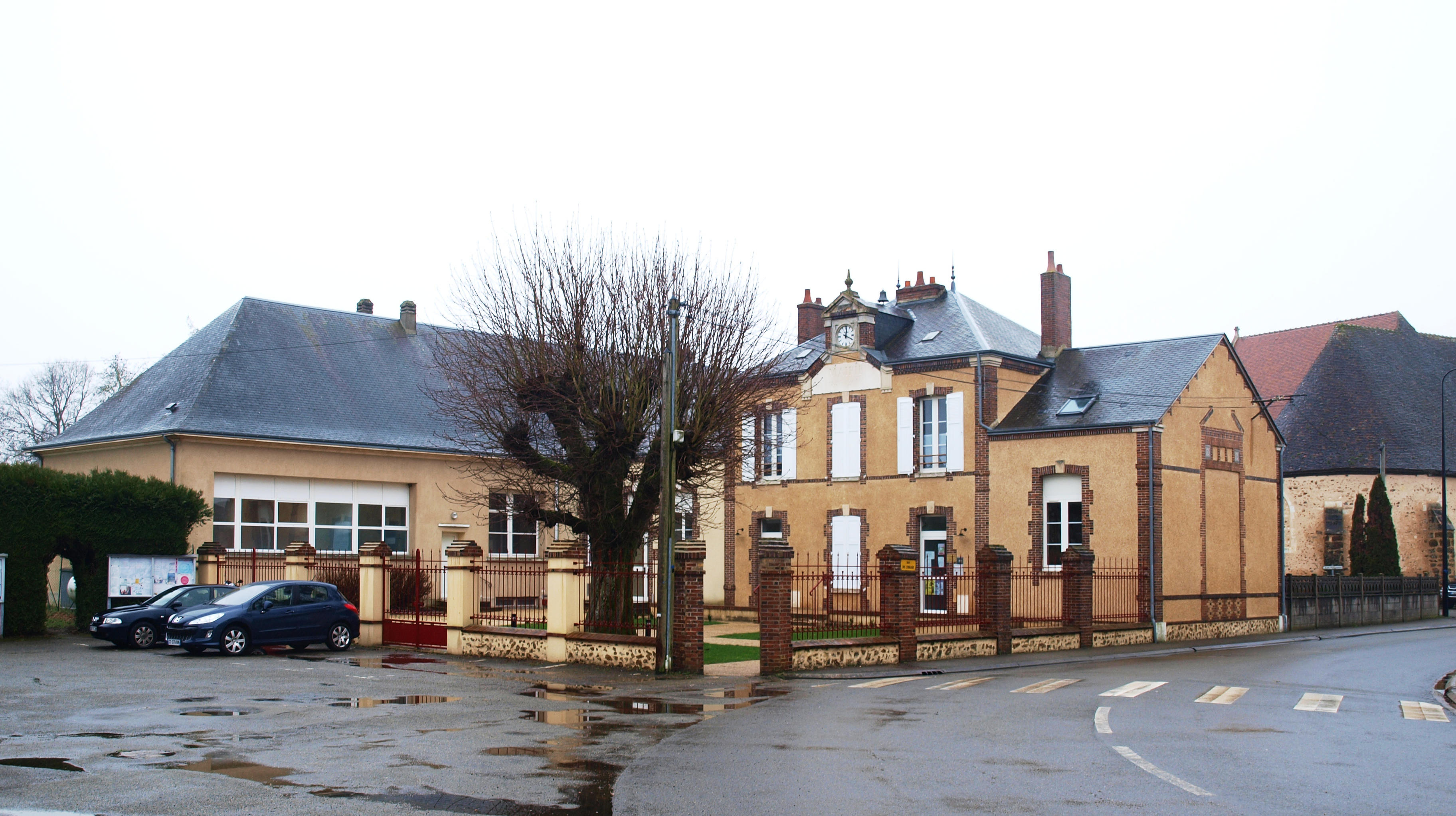 Dampierre-sous-Brou (Eure-et-Loir, France) ; mairie